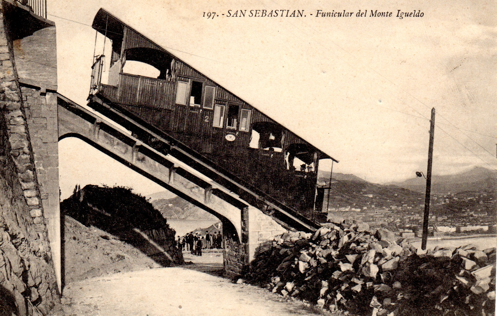 San Sebastián. Funicular de monte Igueldo. Principios de siglo XX